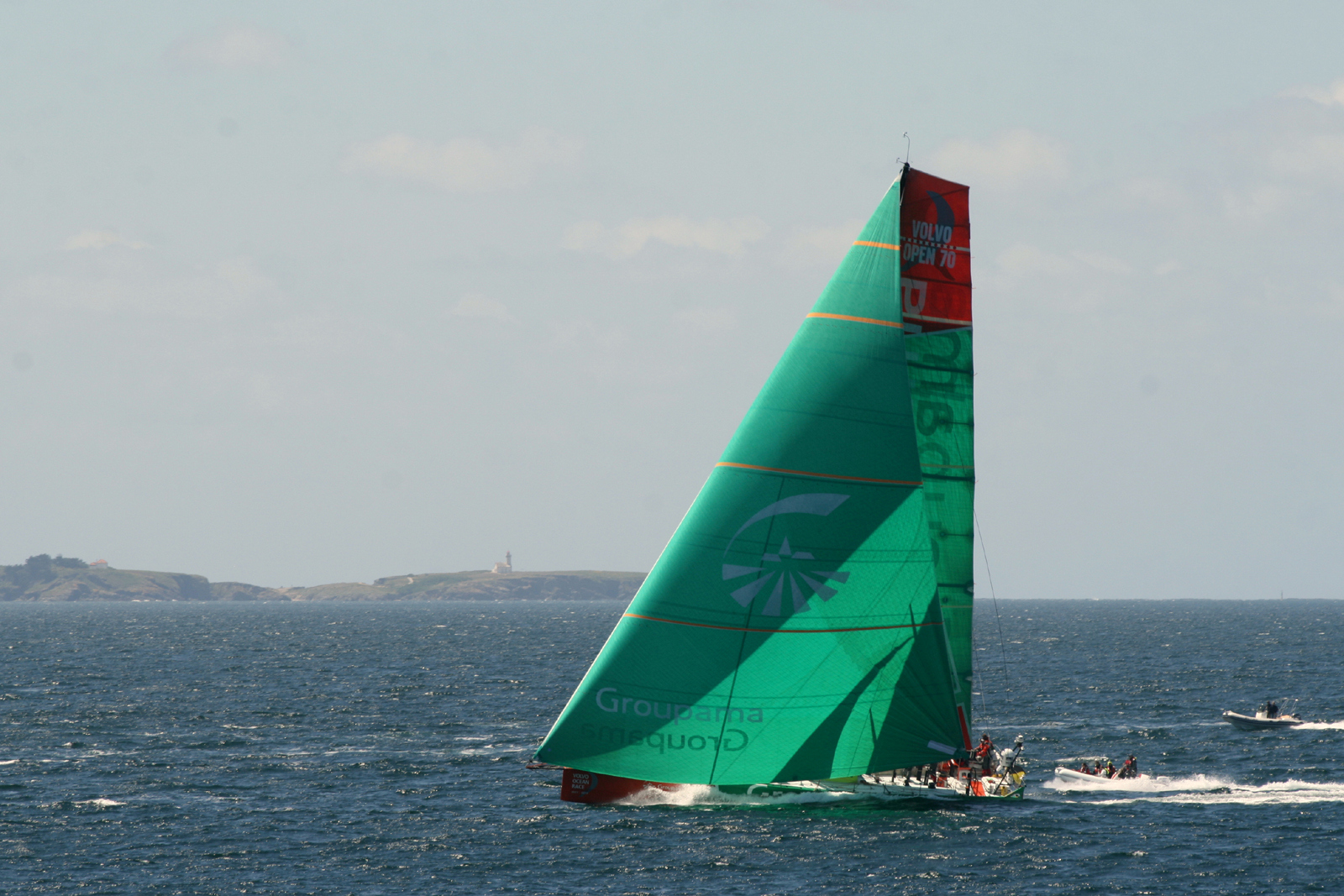 Groupama 4 durant la Volvo Ocean Race devant Belle-Ile